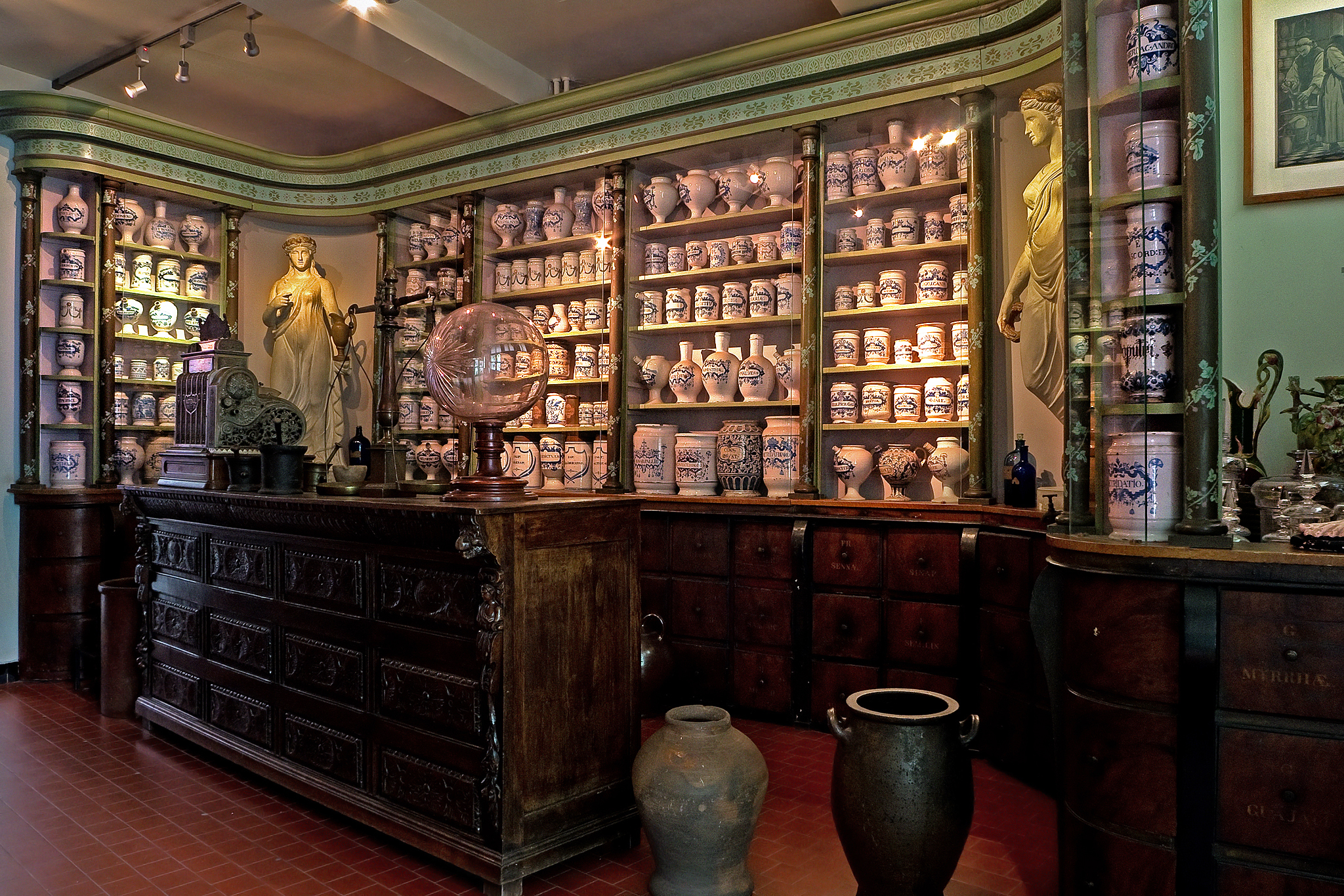 Oude apotheek in het Huis van Alijn in Gent. Niet meer tentoongesteld. This photo of movable heritage has been taken in the Flemish Region